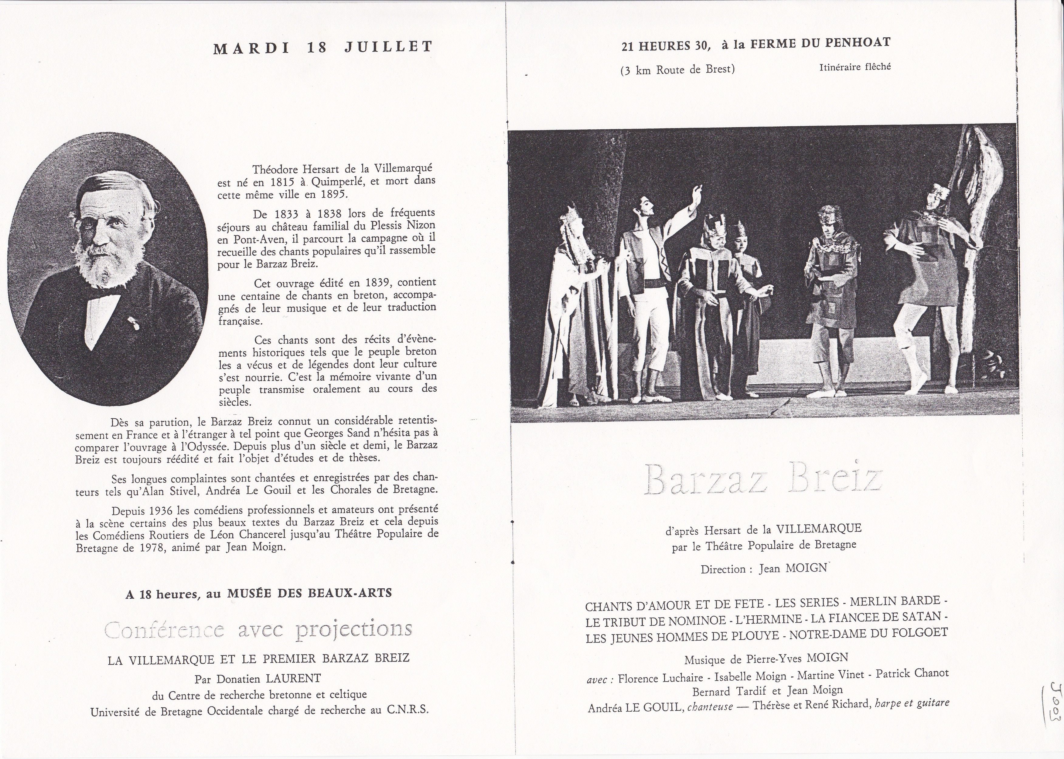 Programme Festival de Cornouailles 1978